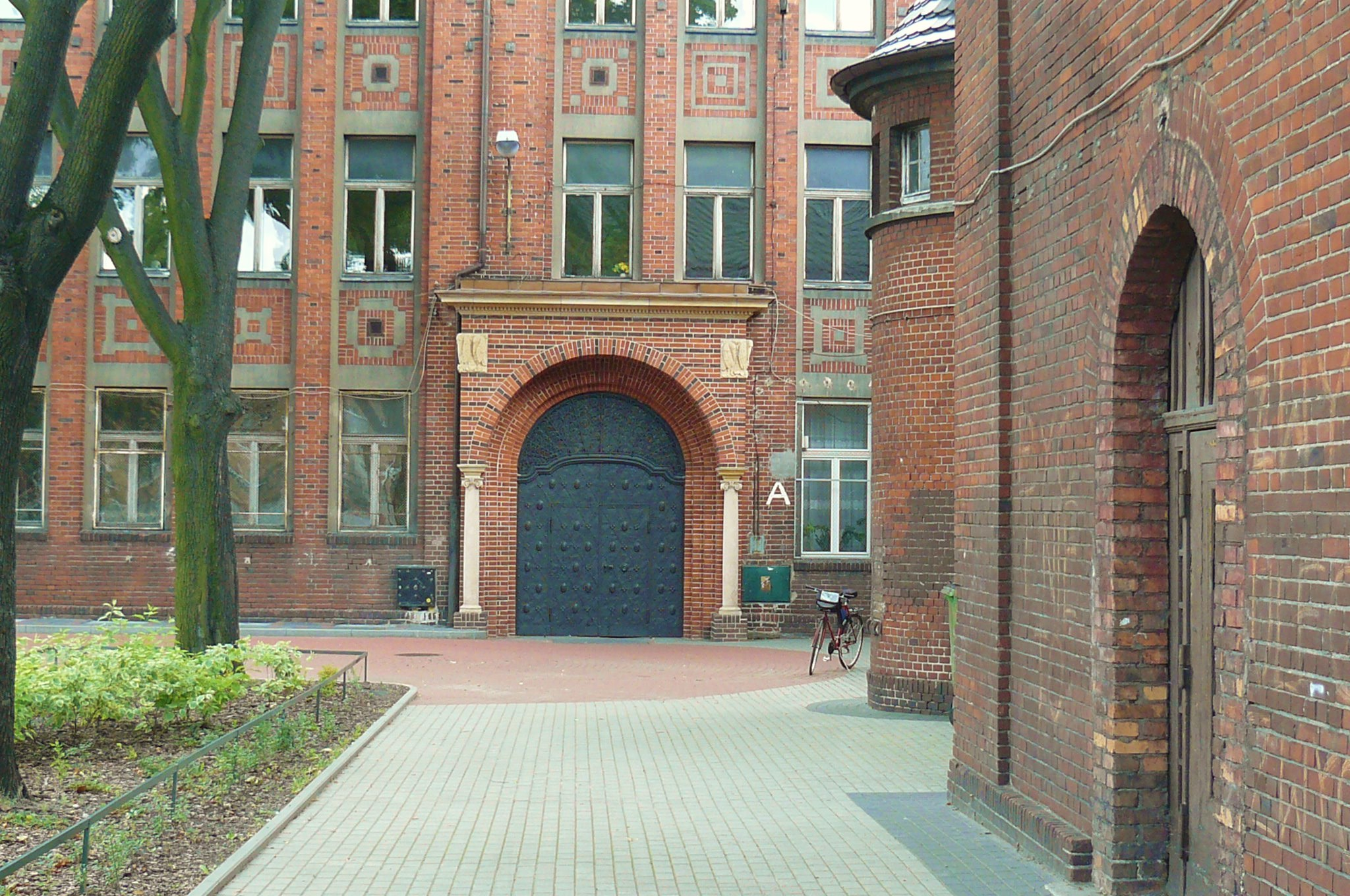 Poznań Jeżyce, ul. Słowackiego 54/60 - Szkoła Podstawowa nr 36 im. Henryka Sucharskiego, zespół zabudowań szkolnych